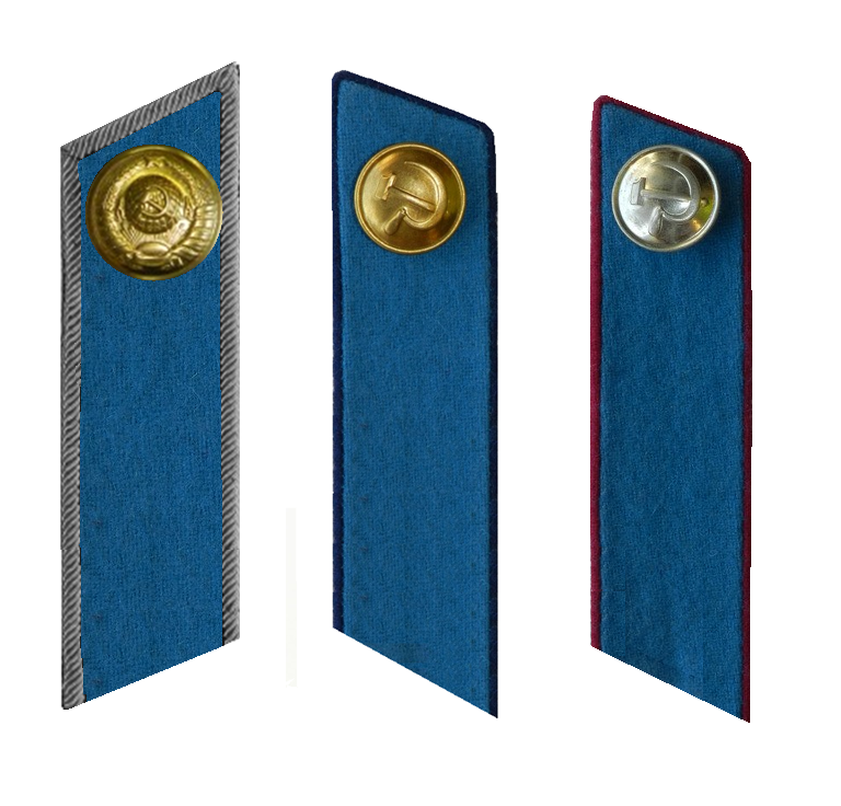 Петлица милиции